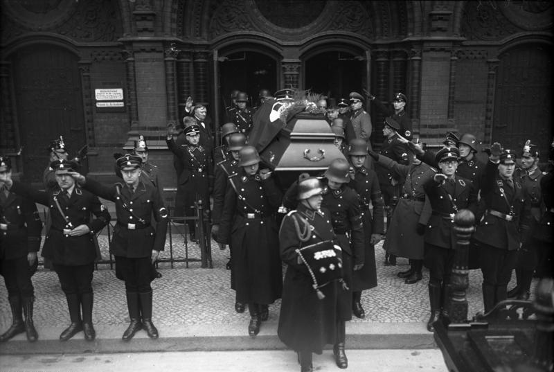 Beisetzung des SS-Gruppenführers Seidel-Dittmarsch in Berlin am 23. Februar 1934.